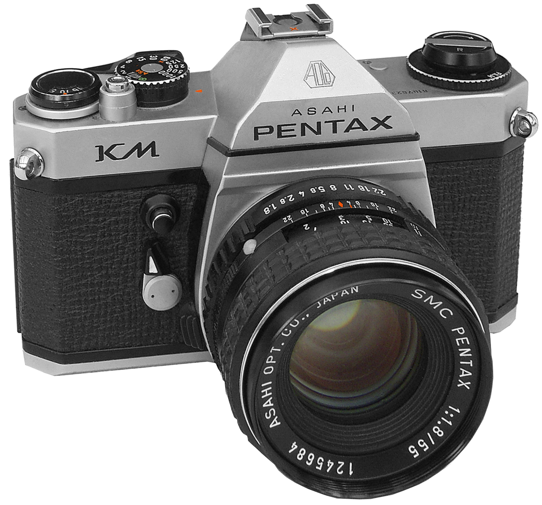 Die Einführung des K-Bajonetts durch Pentax im Jahr 1975 war verbunden mit der Vorstellung einer neuen Kamera-Reihe, der K-Modelle. Sie unterschieden sich äußerlich deutlich von den Vorgängern, den Spotmatics. Das bedeutete aber nicht, dass auch das Innenleben eine Neuentwicklung war. Die KM war nichts anderes als die Spotmatic F in neuem Kleide. Sowohl der Tuch-Schlitzverschluss als auch die bewährte CdS-Belichtungsmessung wurden übernommen. Das besser ausgestattete Schwestermodell KX maß die Belichtung dann schon mit schnellen Silizium-Fotozellen und meine K2 hat als Zeitautomat dann ein deutlich anderes Innenleben, z. B. einen vertikal ablaufenden Metalllamellen-Schlitzverschluss. Zurück zur KM: Es war das preisgünstigste Modell des 1975 eingeführten Dreiergespanns. Die noch spartanischer ausgestattete K1000 kam erst ein Jahr später auf den Markt. Die Produktion der KM und KX wurde schon 1976 wieder eingestellt, zugunsten der kompakteren M-Reihe. Bemerkenswert ist der recht weite Empfindlichkeitsbereich der KM: Er geht von 20 bis 3200 ASA. Es gibt auch kein Batterieproblem - die immer noch erhältlichen Siberoxid-Zellen (SR44) können verwendet werden.